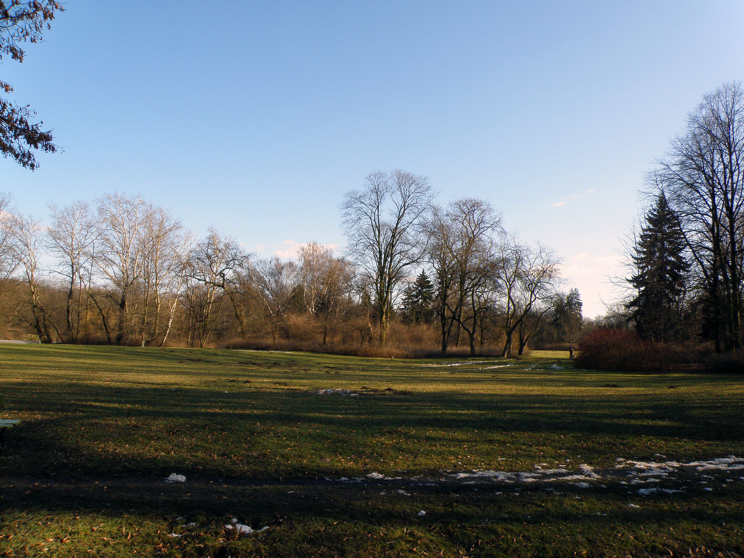 Warszawa, Park Skaryszewski